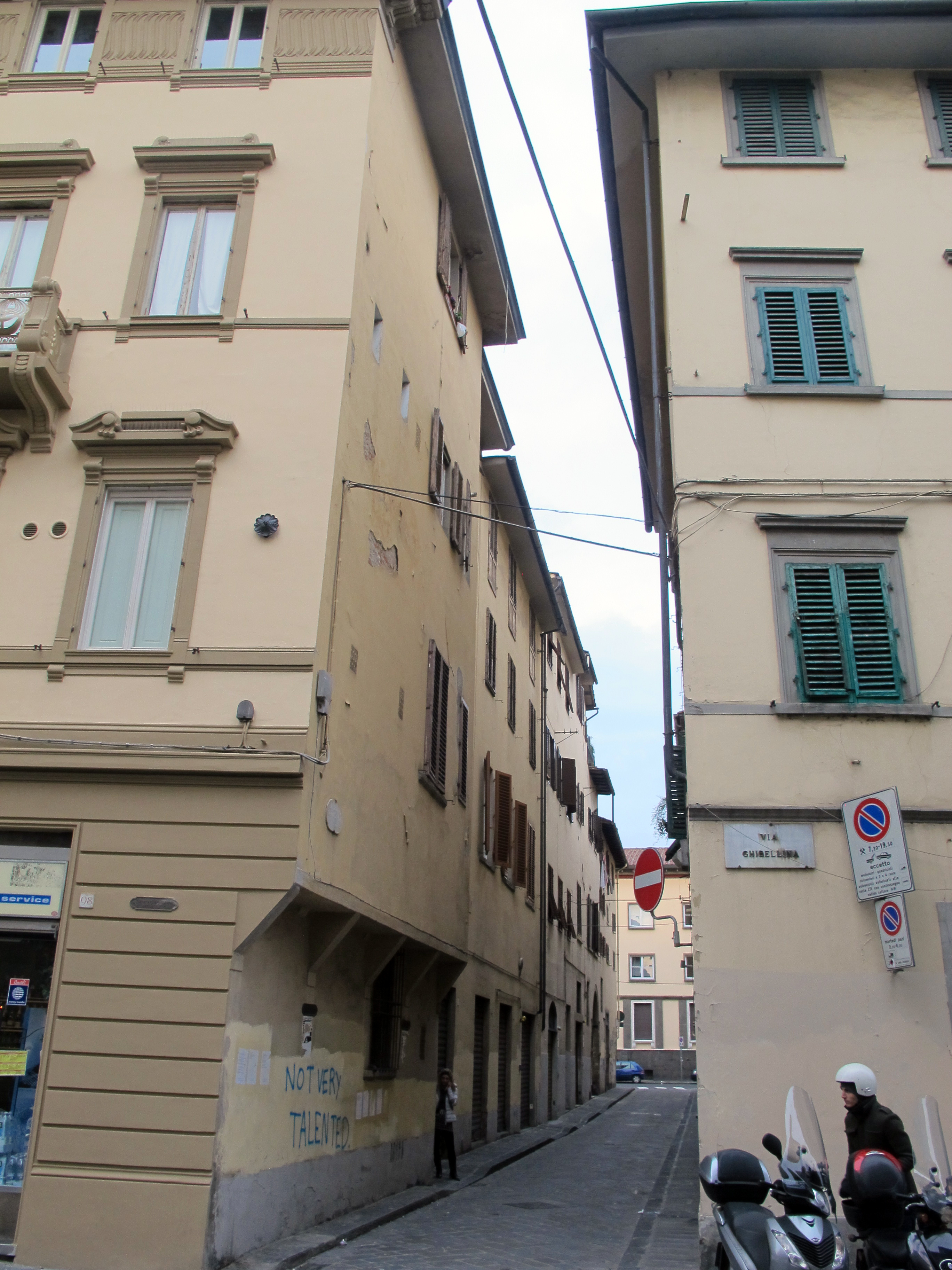 Via rosa